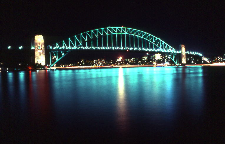 sydney harbour bridge